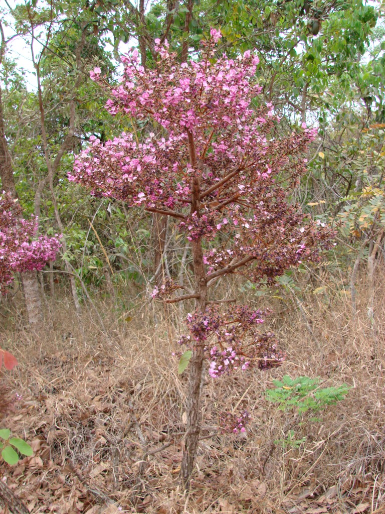 Andira humilis - FABACEAE Jardim Botânico de Brasília - Distrito Federal - Brasil.